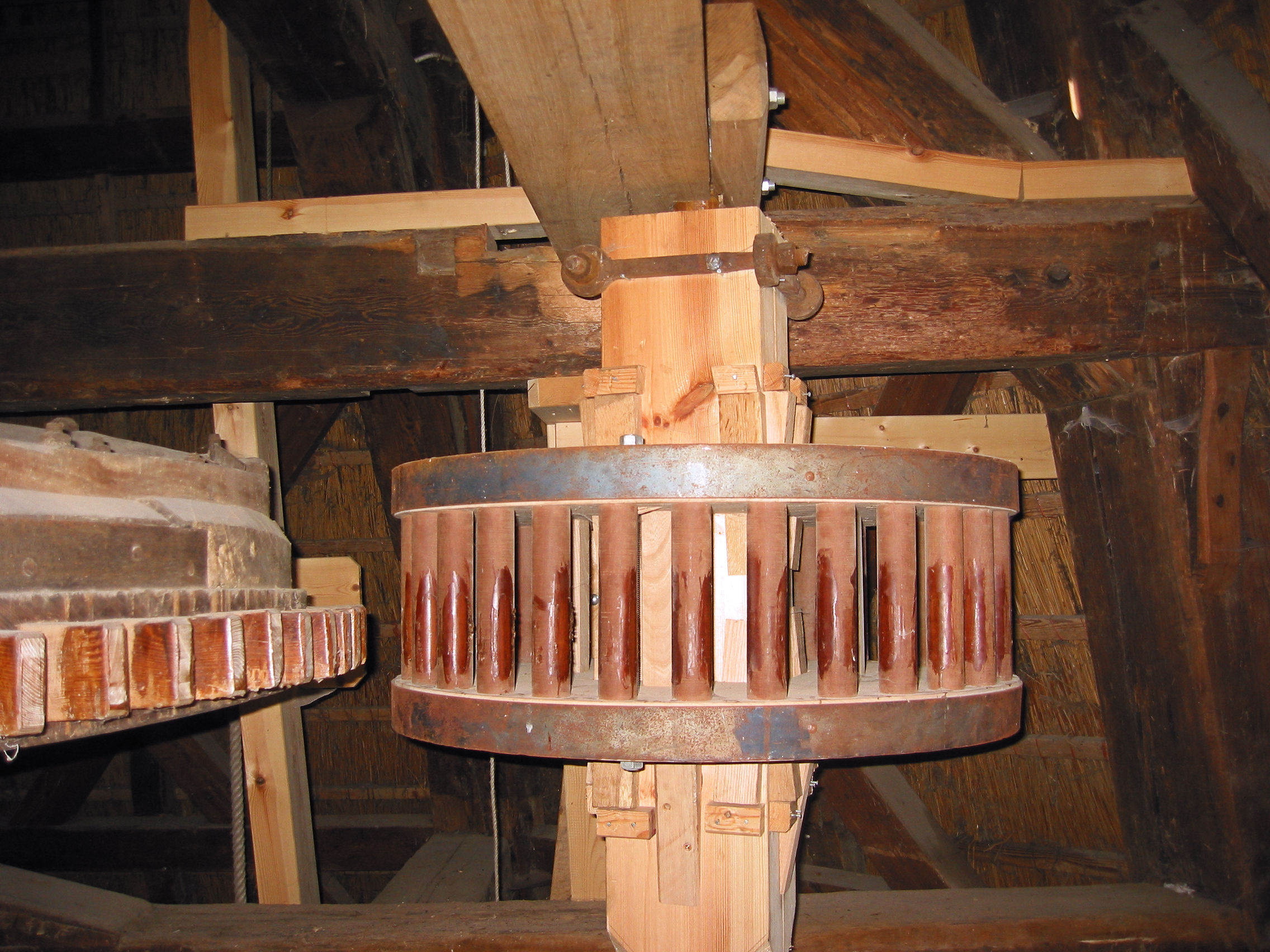 Molen De Hoop in Appel, steenspilrondsel, Gelderland, the Netherlands